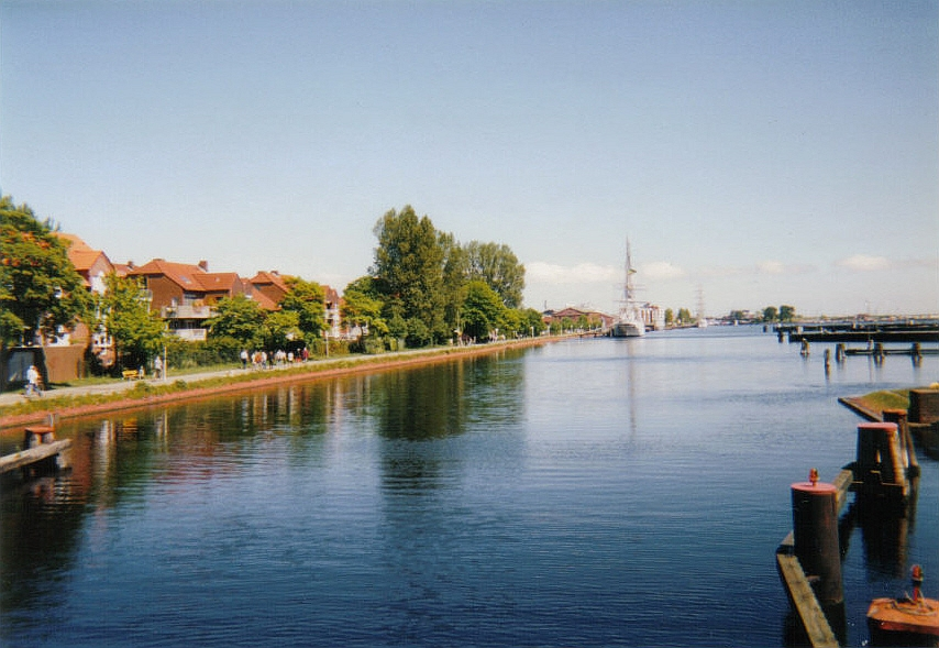 Wilhelmshaven, Niedersachsen